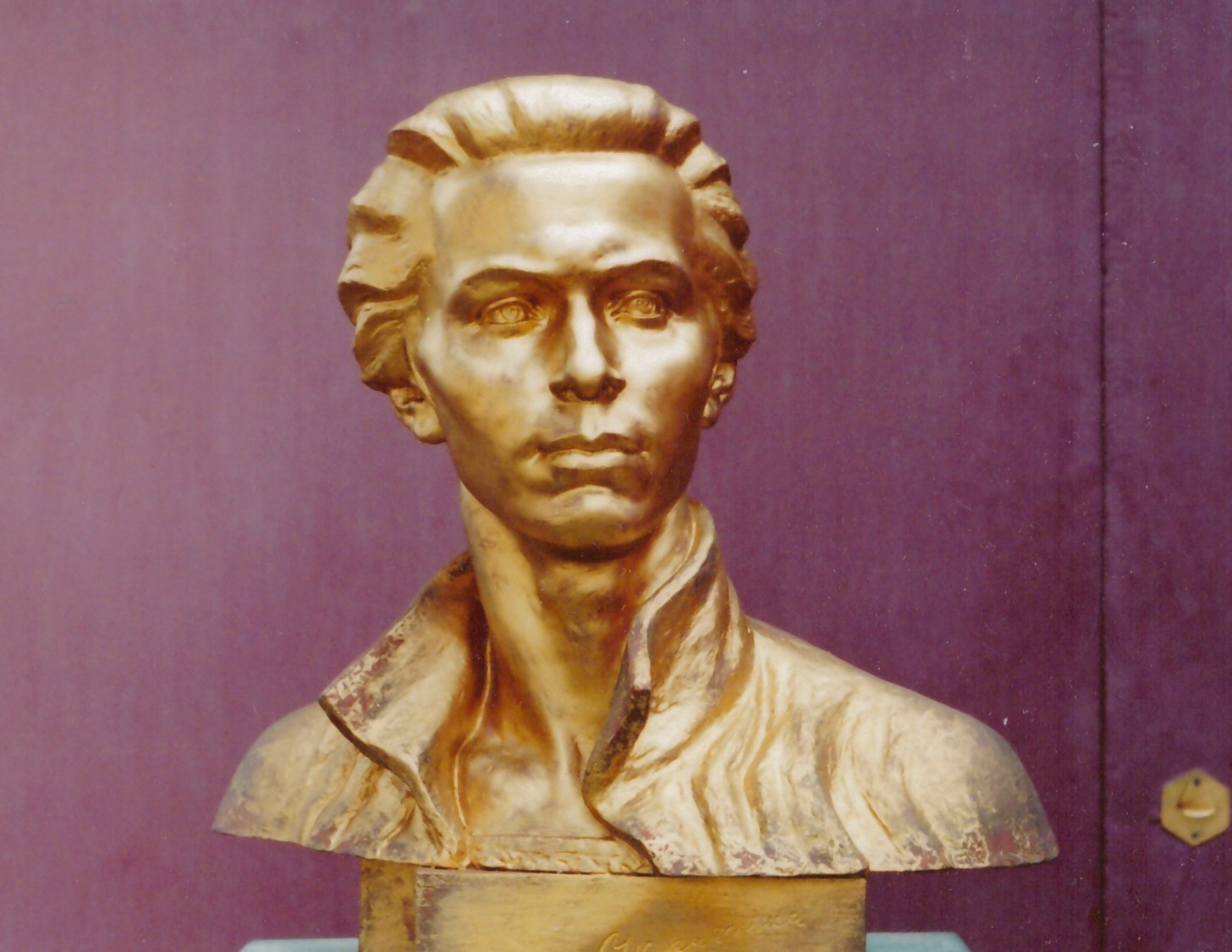 Портрет Лесі Українки. 2004. Скульптор Таранченко В.О. Гіпс тонований. 44 х 53 х 31.